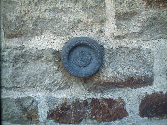 Nivellementpunkt an der neuen St. Alexanderkirche in Wallenhorst